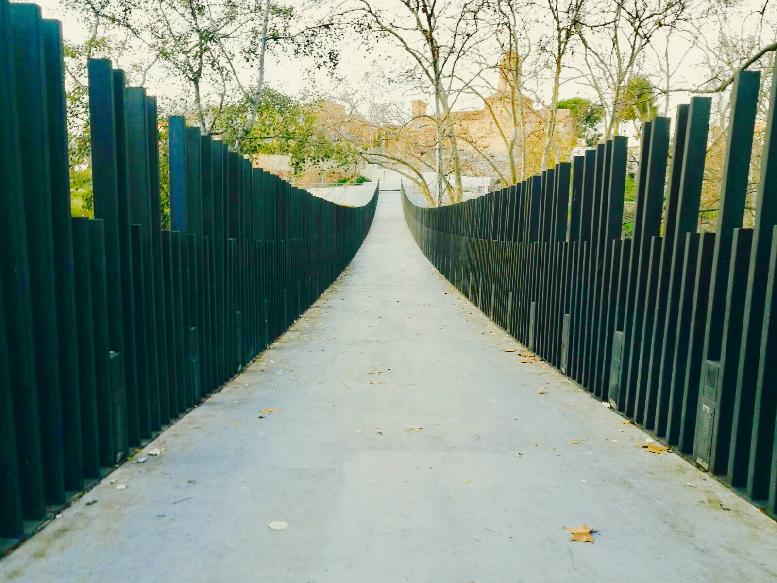 Parque de Vallparadís. Puente colgante y vista del conjunto monumental románico